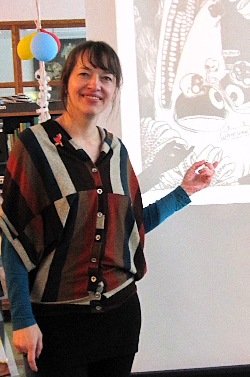 Ulli Lust på Kulturnatt Stockholm 24 april 2010.